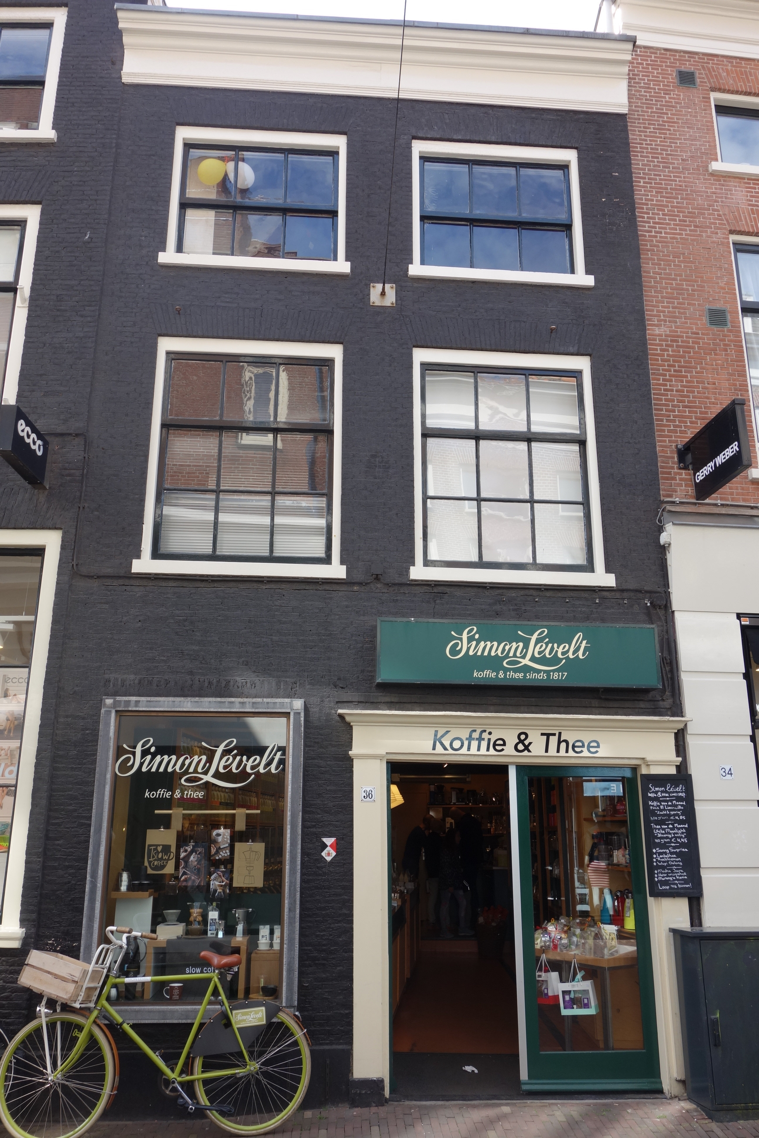 Gemeentelijk monument met lijstgevel aan de Barteljorisstraat in Haarlem.